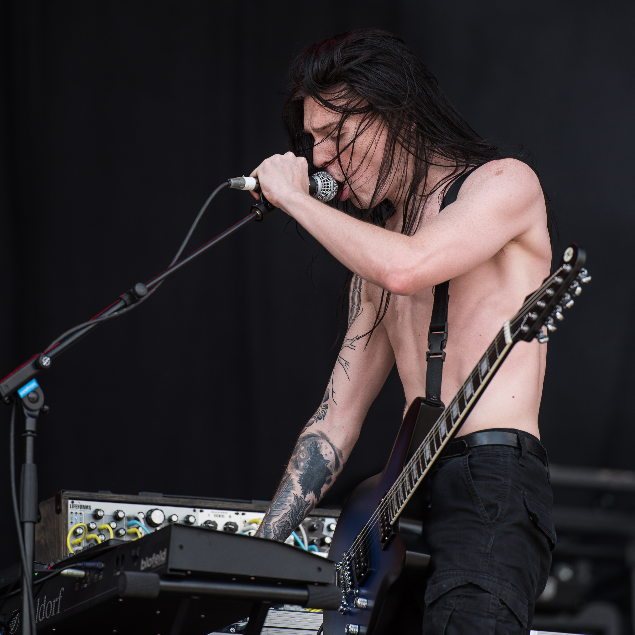 ARGO-Konzerte,Code Orange,Eric Balderose,Konzert,Livekonzert,Livemusik,Musik,RiP,Rock im Park 2017,Zeppelin Stage